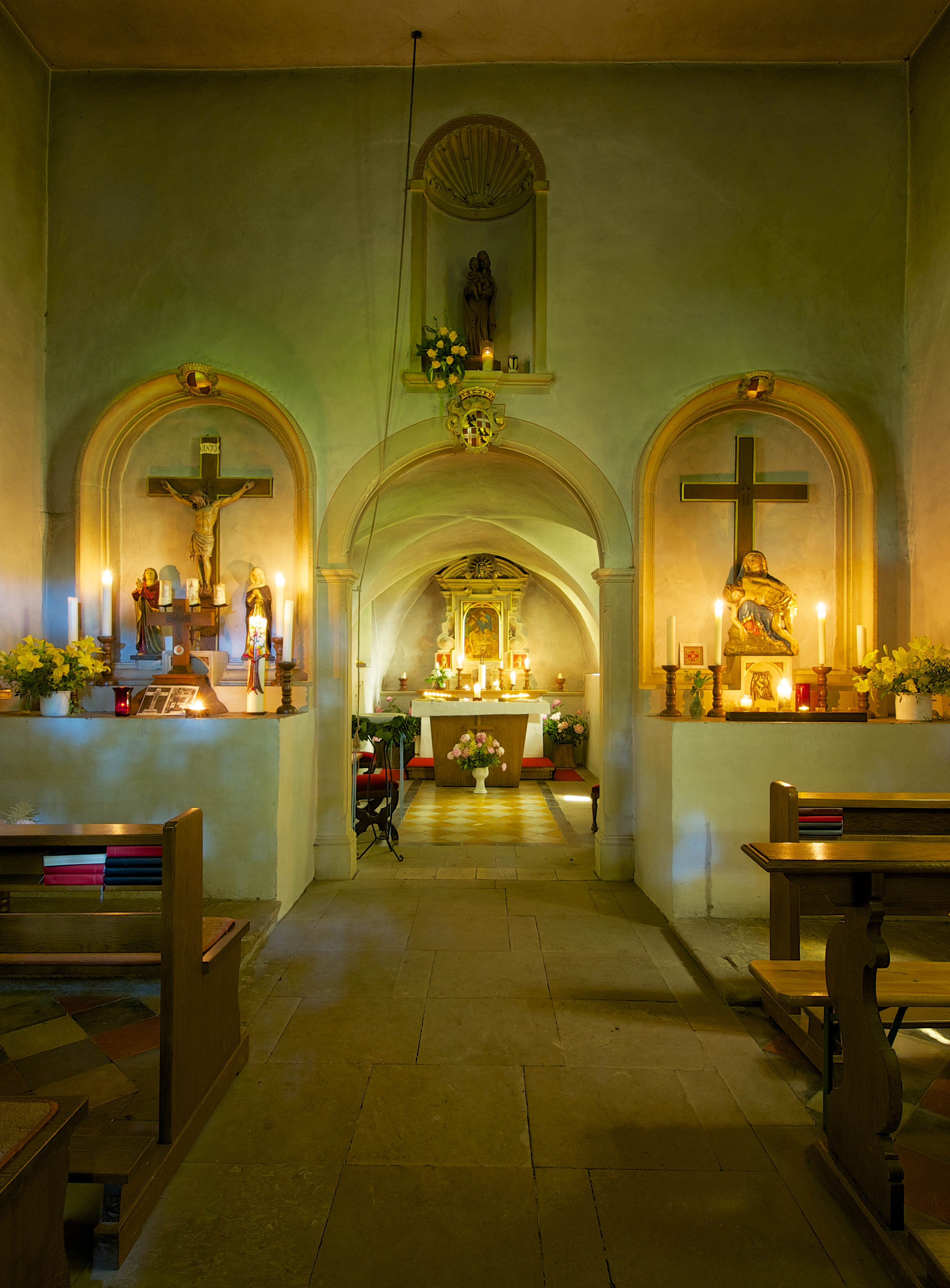 Innenraum der Kapelle zur Hilligen Seele bei Paderborn